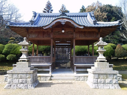 親さまのお墓